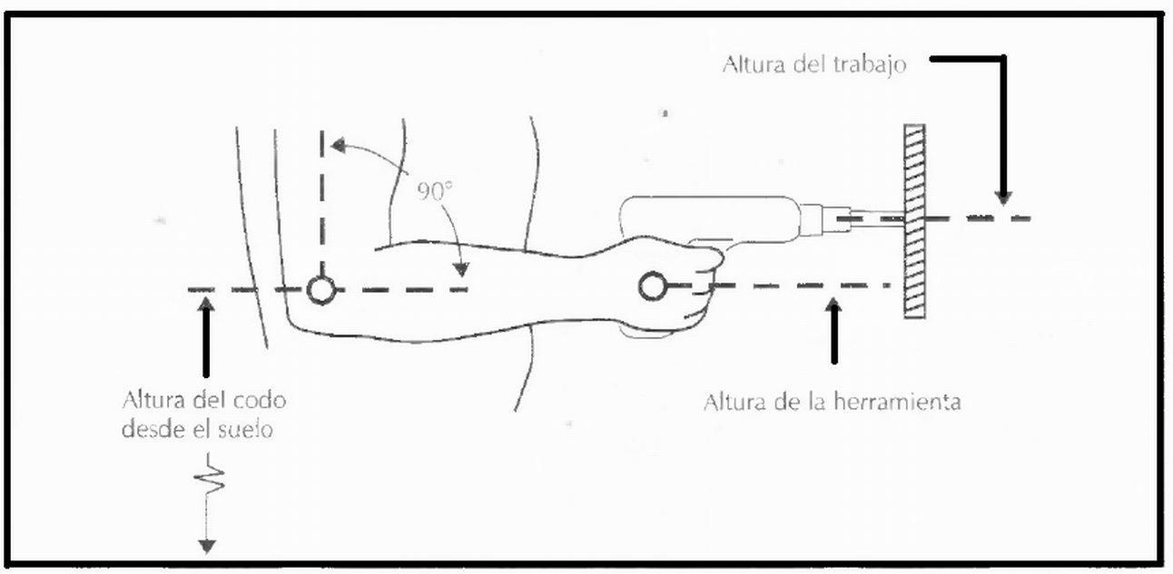 Calculo para la altura de trabajo desde el piso a la altura del codo a 90°